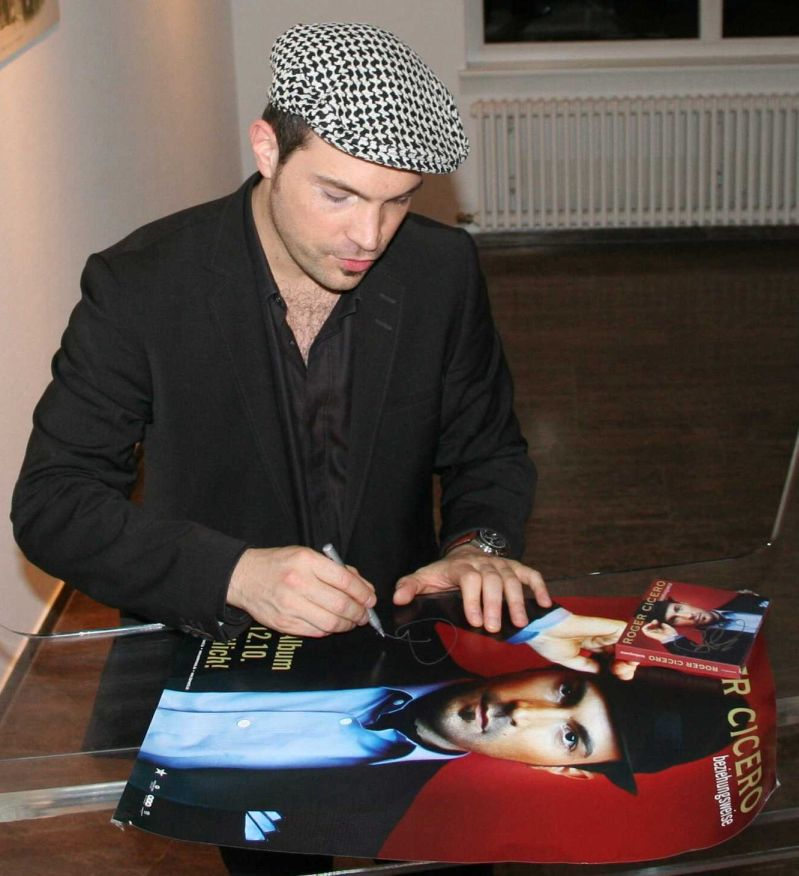 Roger Cicero nach einem kleinen Konzert in der Sektkellerei Kupferberg in Mainz